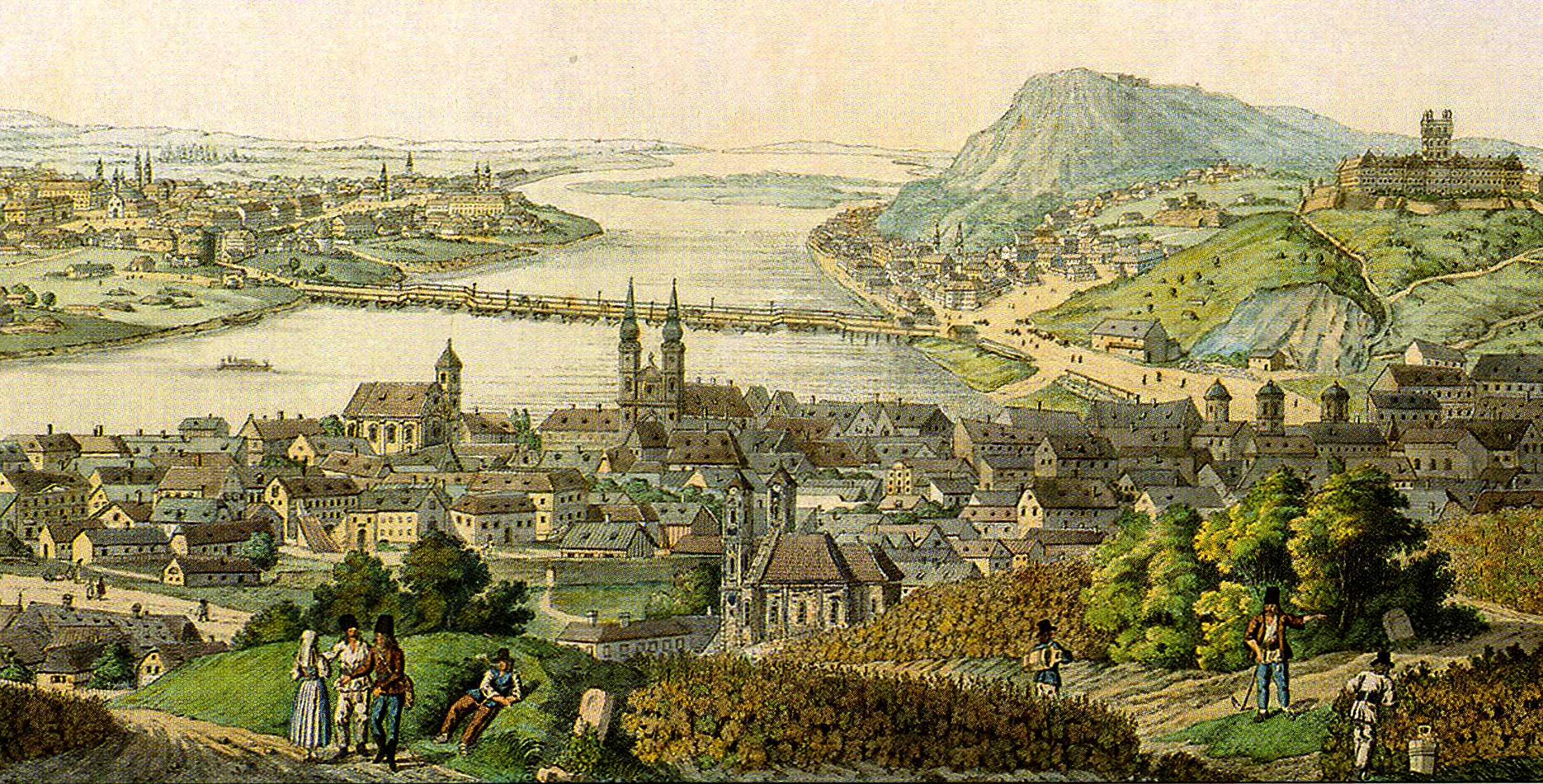 Joseph és Peter Schaffer: Buda és Pest városképe, 1787-ben. A kép előterében a Víziváros fölötti szőlőskertek láthatók. A hajóhíd budai hídfője láthatóan a Tabánban ér partot